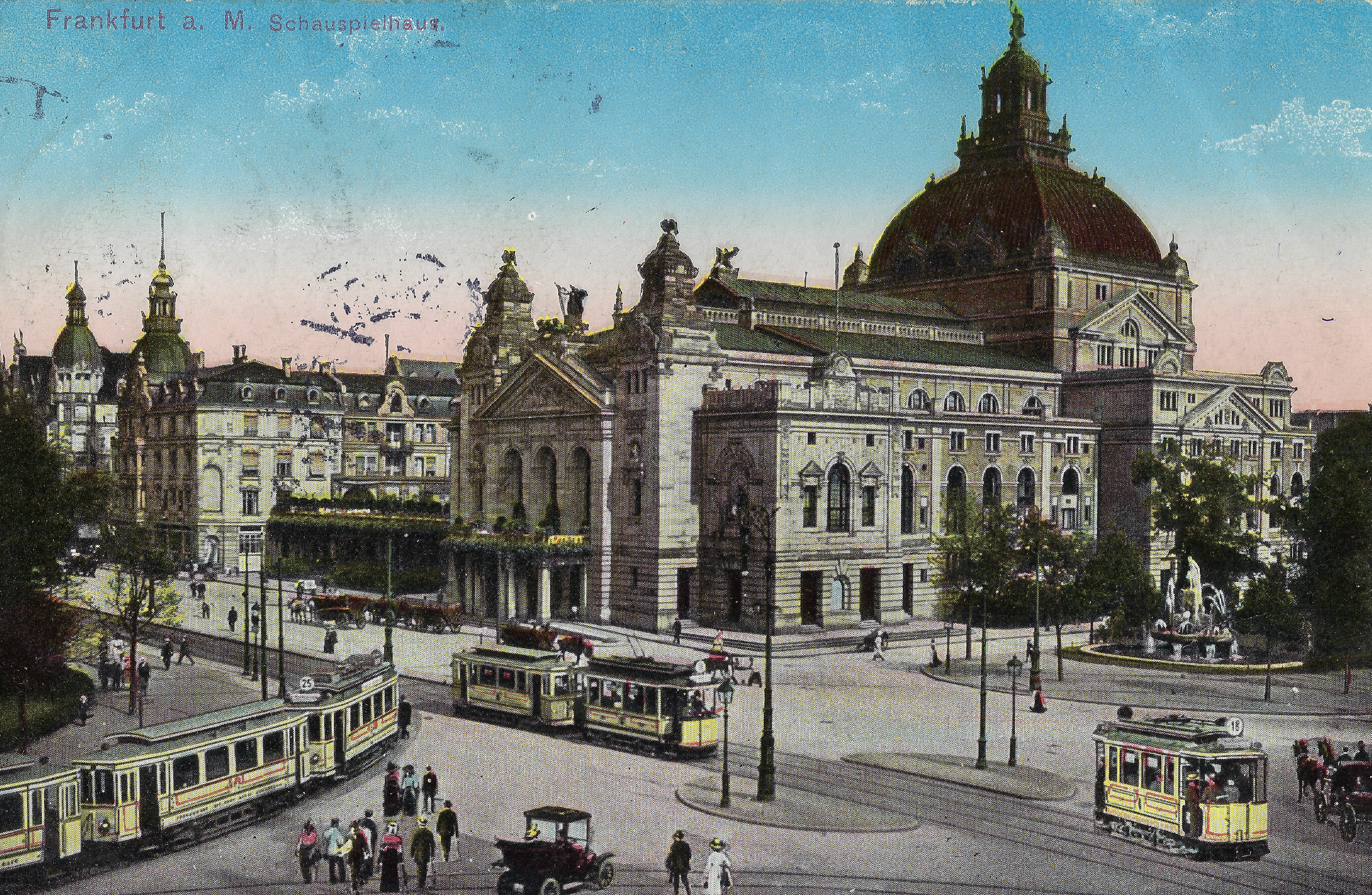 Frankfurter Schauspielhaus, koloriert